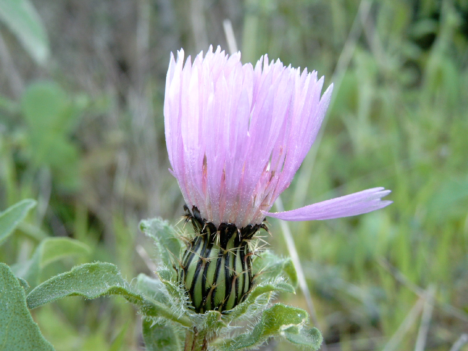 Centaurea pullata Species Centaurea pullata Familia Asteraceae